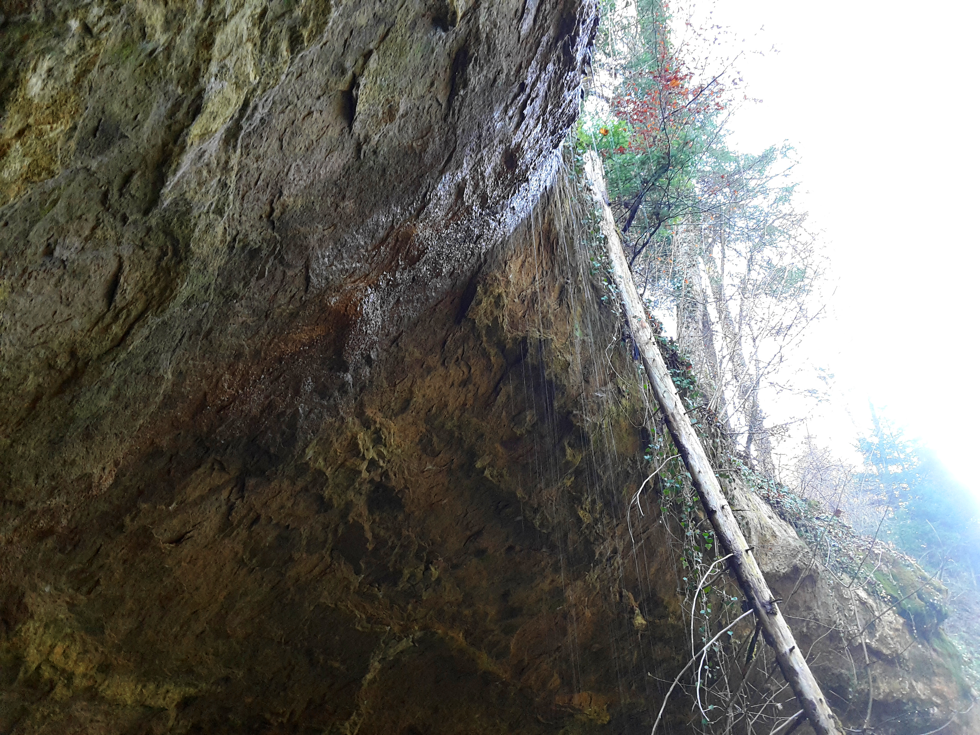 Sturz des Geissweidbächlis ins Gruenhaldentobel zwischen den Kantonen Zürich und Aargau, Schweiz